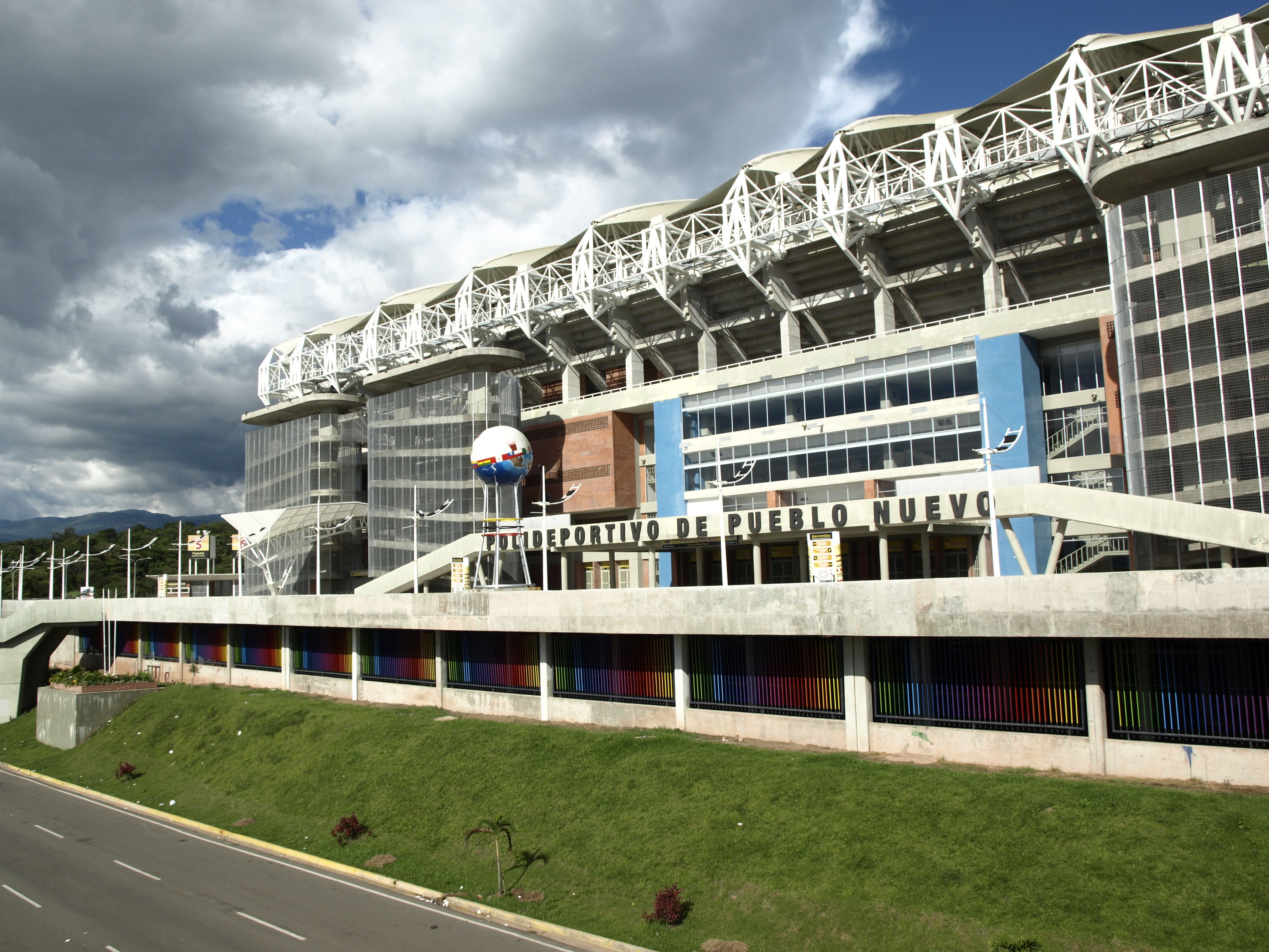 Llamado comúnmente el templo sagrado del fútbol venezolano. Ubicado en San Cristóbal, estado Táchira.